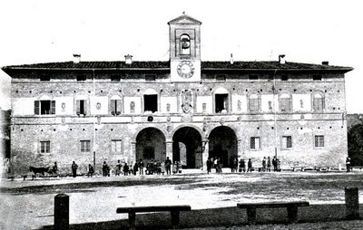 scansione da foto originale di fine ottocento di proprietà dell'autore